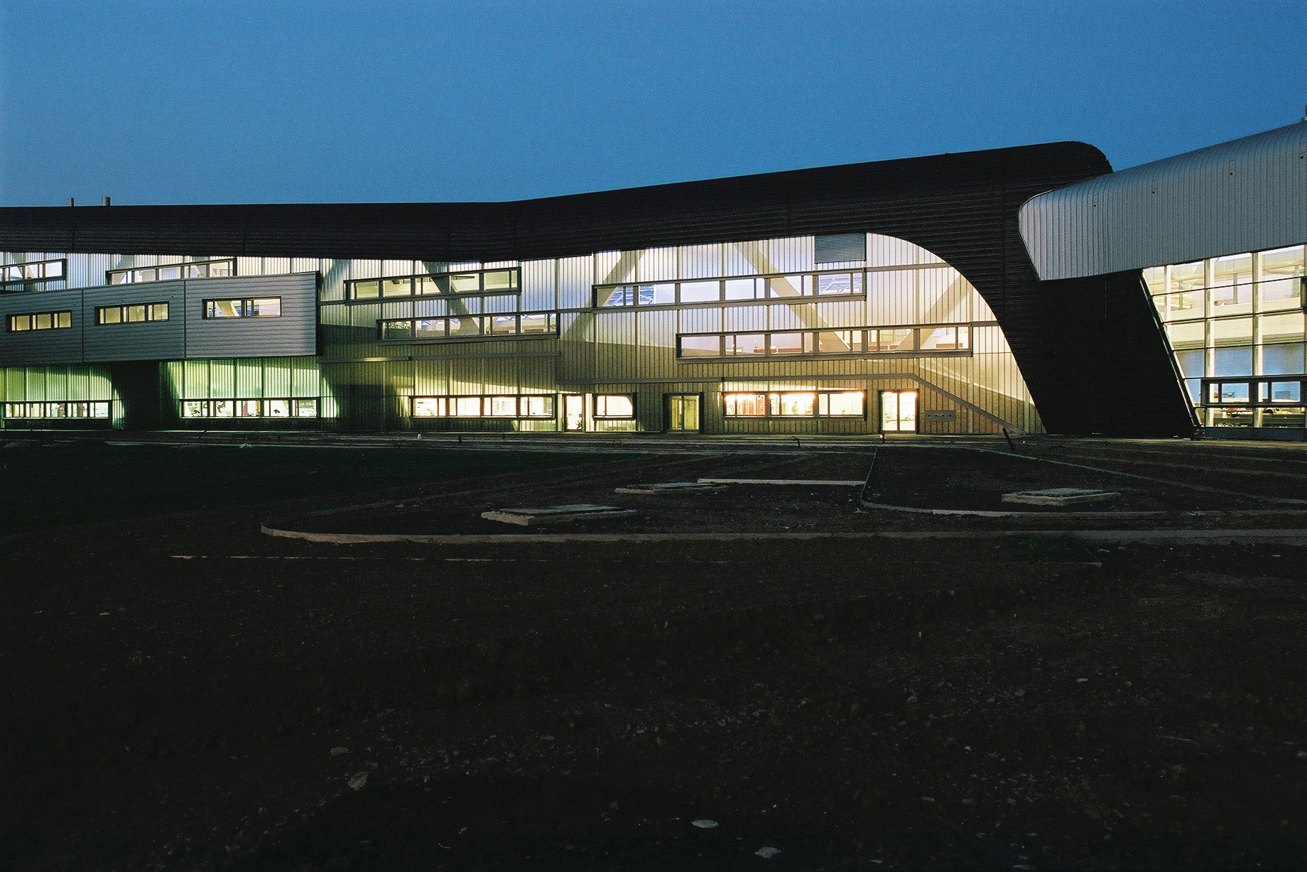 BMW Werk Leipzig - Zentralgebäude aussen